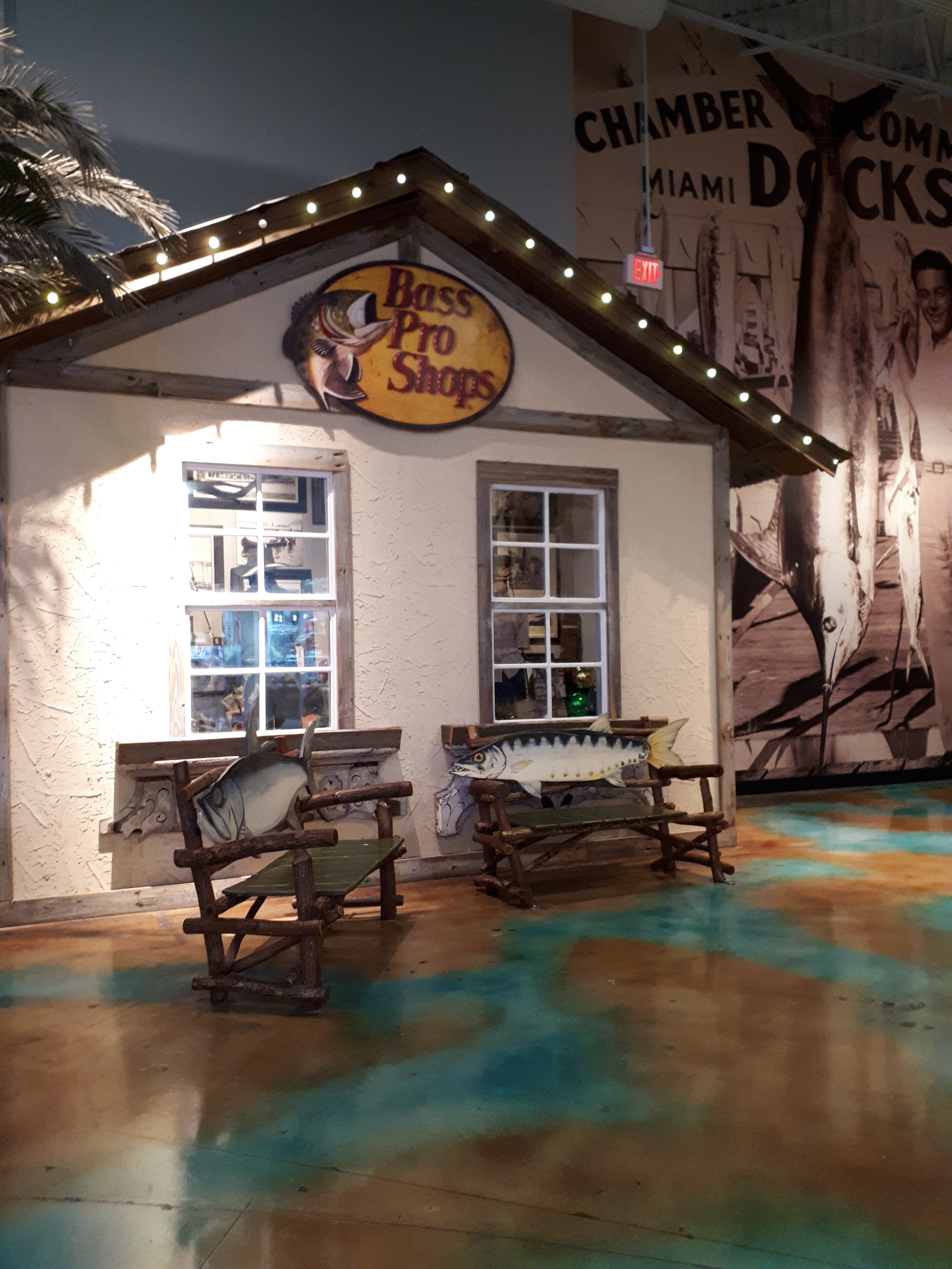 Bass Pro Shops in der Dolphin Mall in Sweetwater, Florida, im November 2017